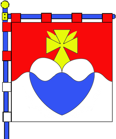 Прапор села Поділ (Срібнянський район)